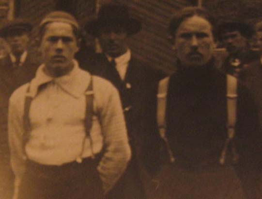 Jääkäri Aarne Tauno Varonen (kuvassa oikealla, musta paitainen) veljensä Väinön Johanneksen kanssa.